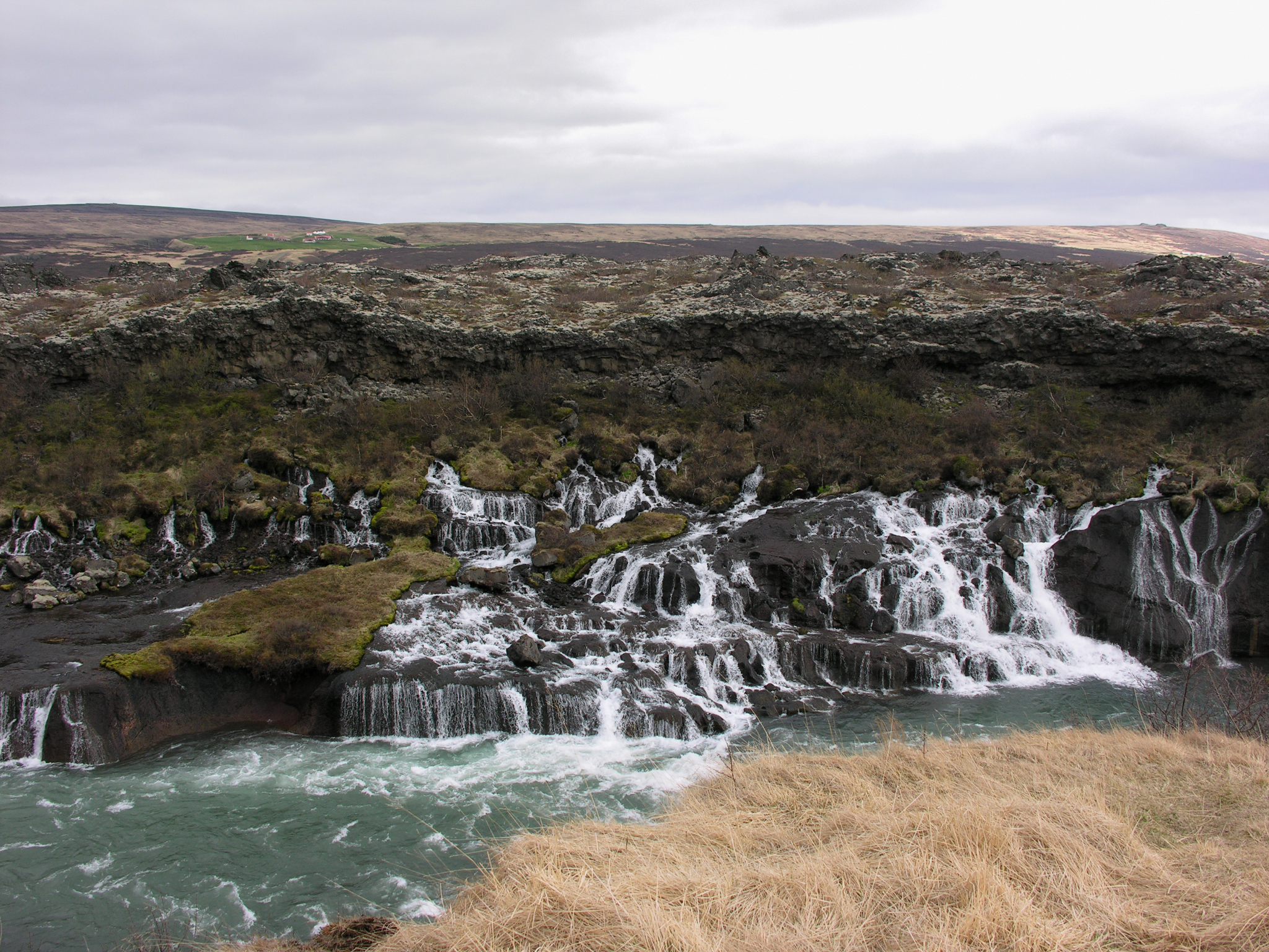 Iceland, Hraunfossar